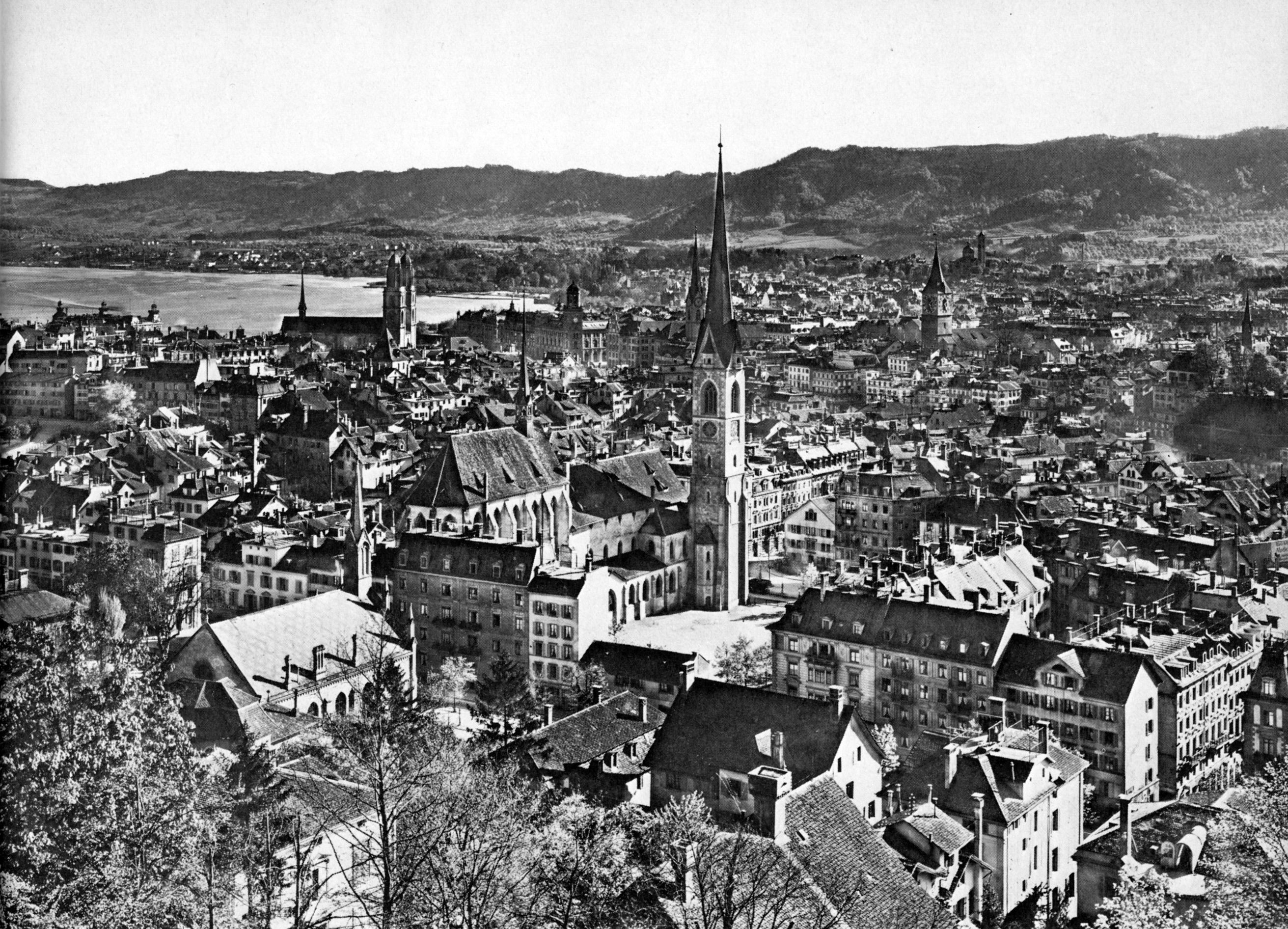 Blick von der Polyterrasse auf das Predigerkloster in Zürich vor 1915 (Bau der Zentralbibliothek), nach 1900 (Fertigstellung des Predigerturms)